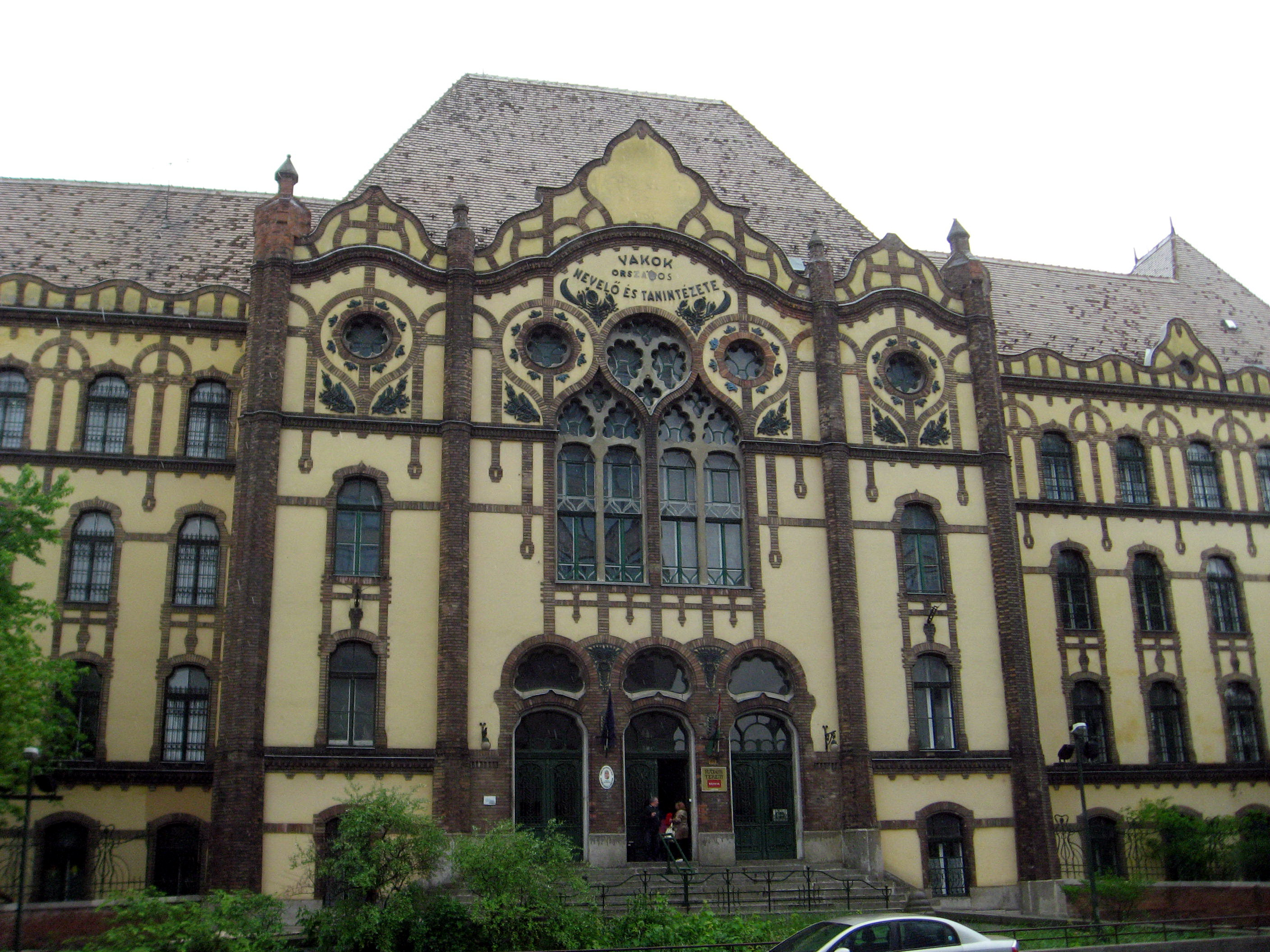 Budapešť